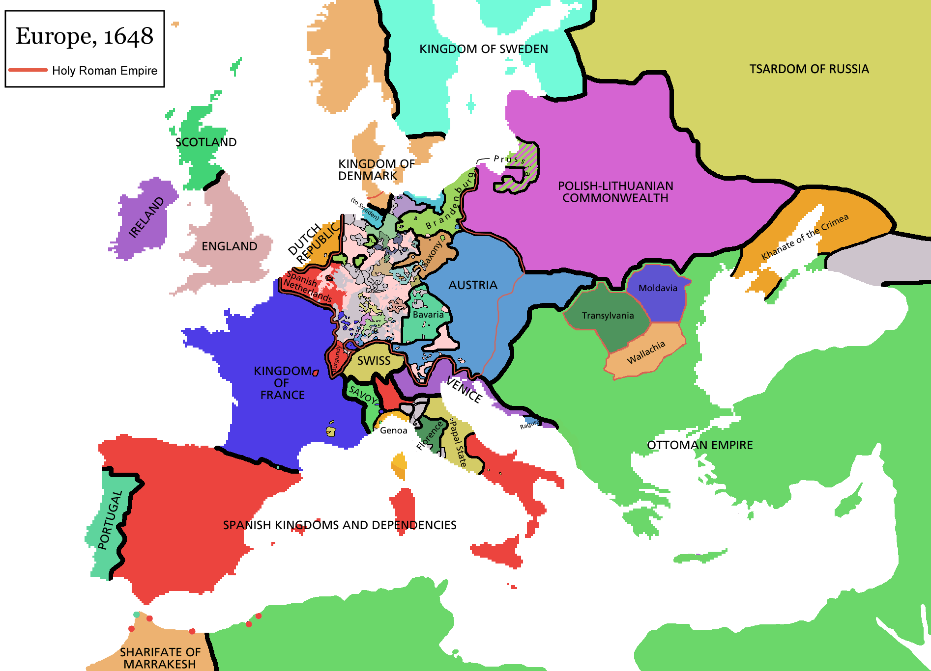 پنجابی: قریم یورتی ، یورپ دے 1648ء دے نقشے وچ.